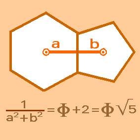 En el icosadro truncado y los cuerpos geométricos semejantes a él, la clave matemática está en la relación geométrica entre los hexágonos y los pentágonos que los configuran.